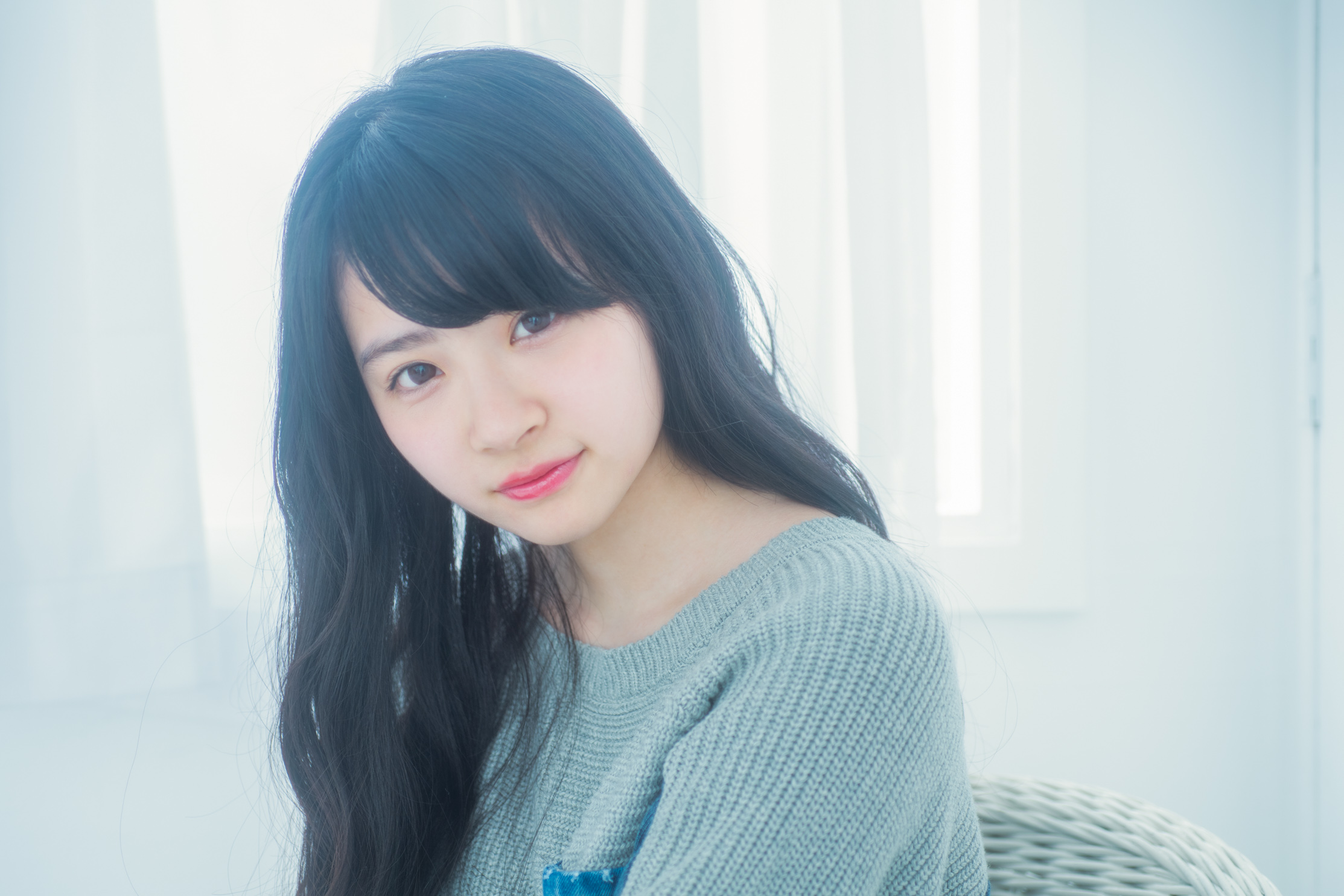 安齋陽菜本人